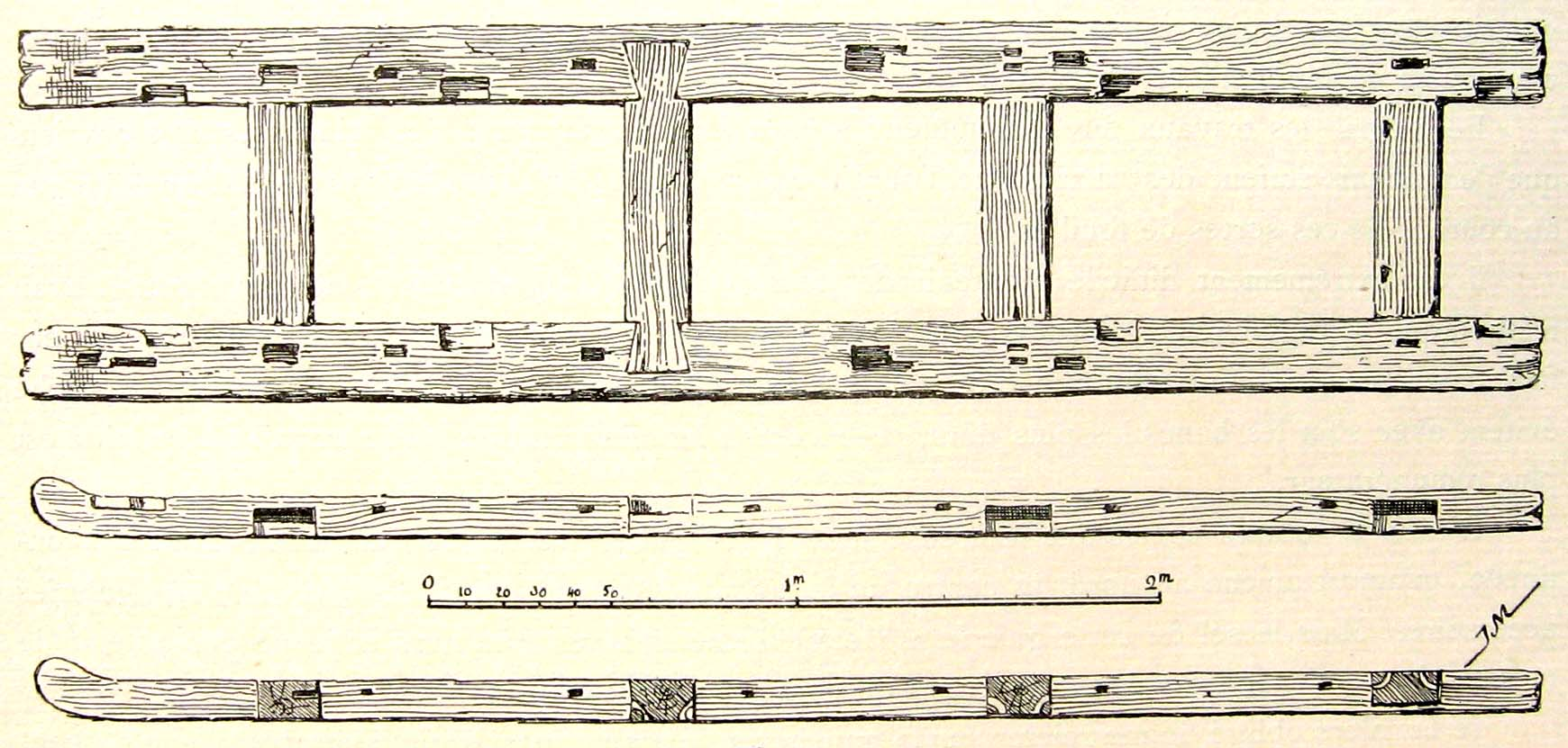 Traineau de transport des barques funéraires du complexe funéraire de Sésostris III à Dahchour : il mesure 4,21 m de long pour une largeur de 0,78 m